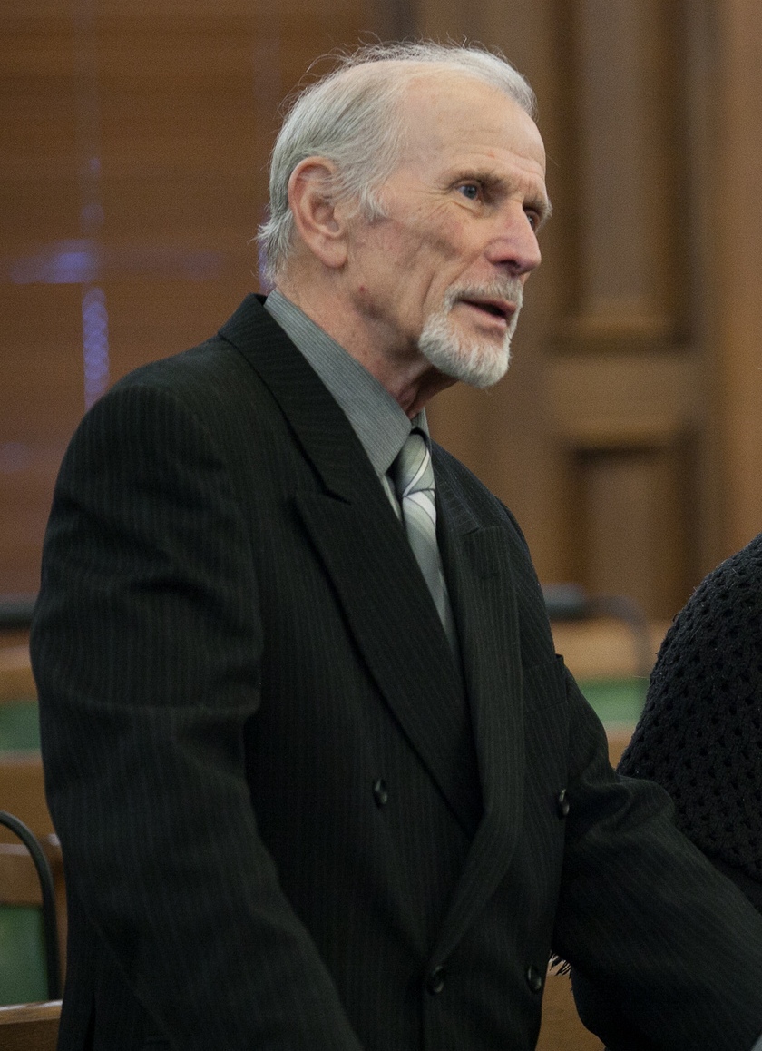 detail of: 2013.gada 21.janvāris. Saeimas priekšsēdētāja Solvita Āboltiņa tiekas ar 1991.gada barikāžu laika žurnālistiem.